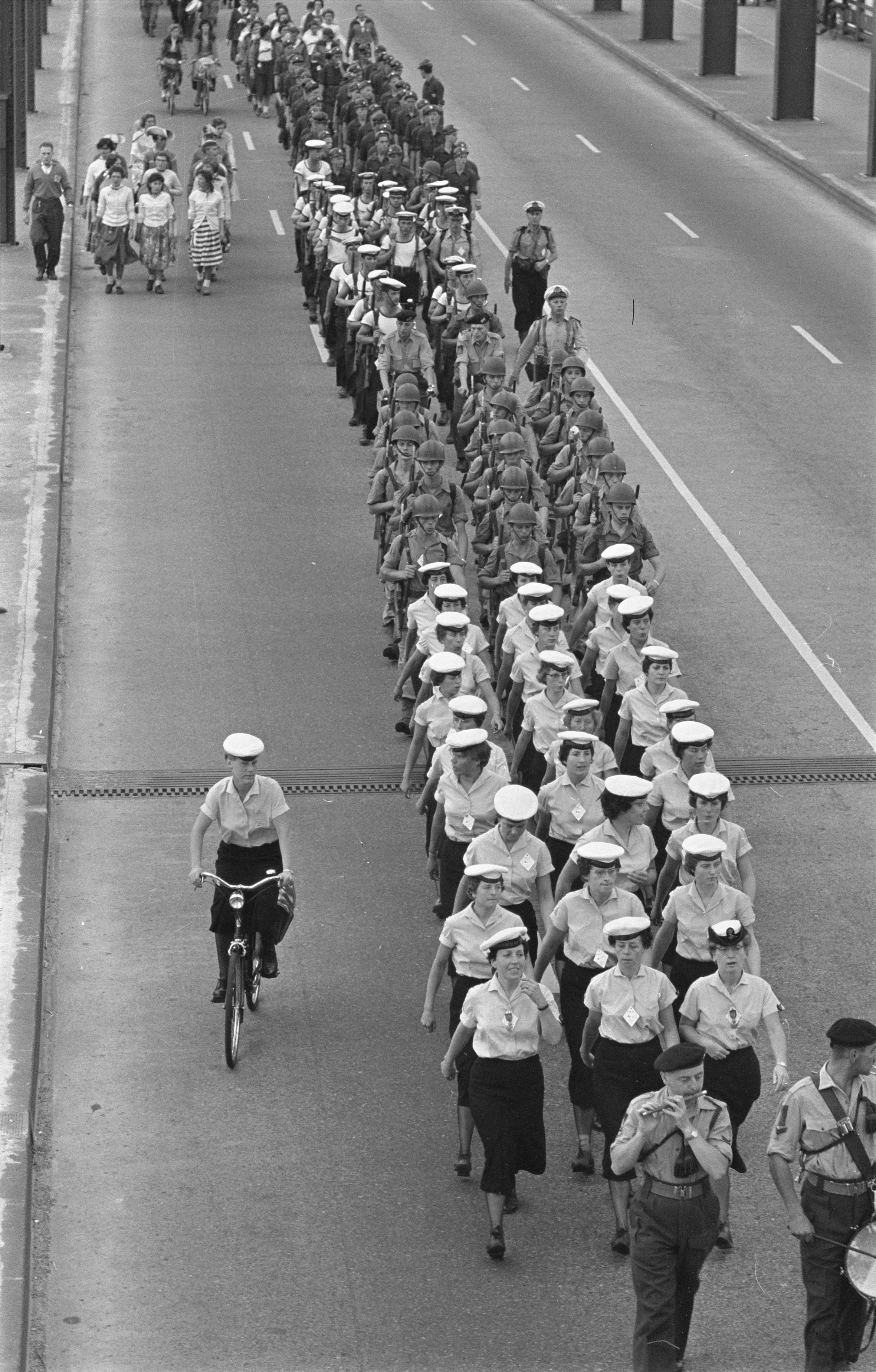 Collectie / Archief : Fotocollectie Anefo Reportage / Serie : [ onbekend ] Beschrijving : Start vierdaagse te Nijmegen, militairen en Marvas waren present Datum : 20 juli 1959 Fotograaf : Pot, Harry / Anefo Auteursrechthebbende : Nationaal Archief Materiaalsoort : Negatief (zwart/wit) Nummer archiefinventaris : bekijk toegang 2.24.01.05 Bestanddeelnummer : 910-5407